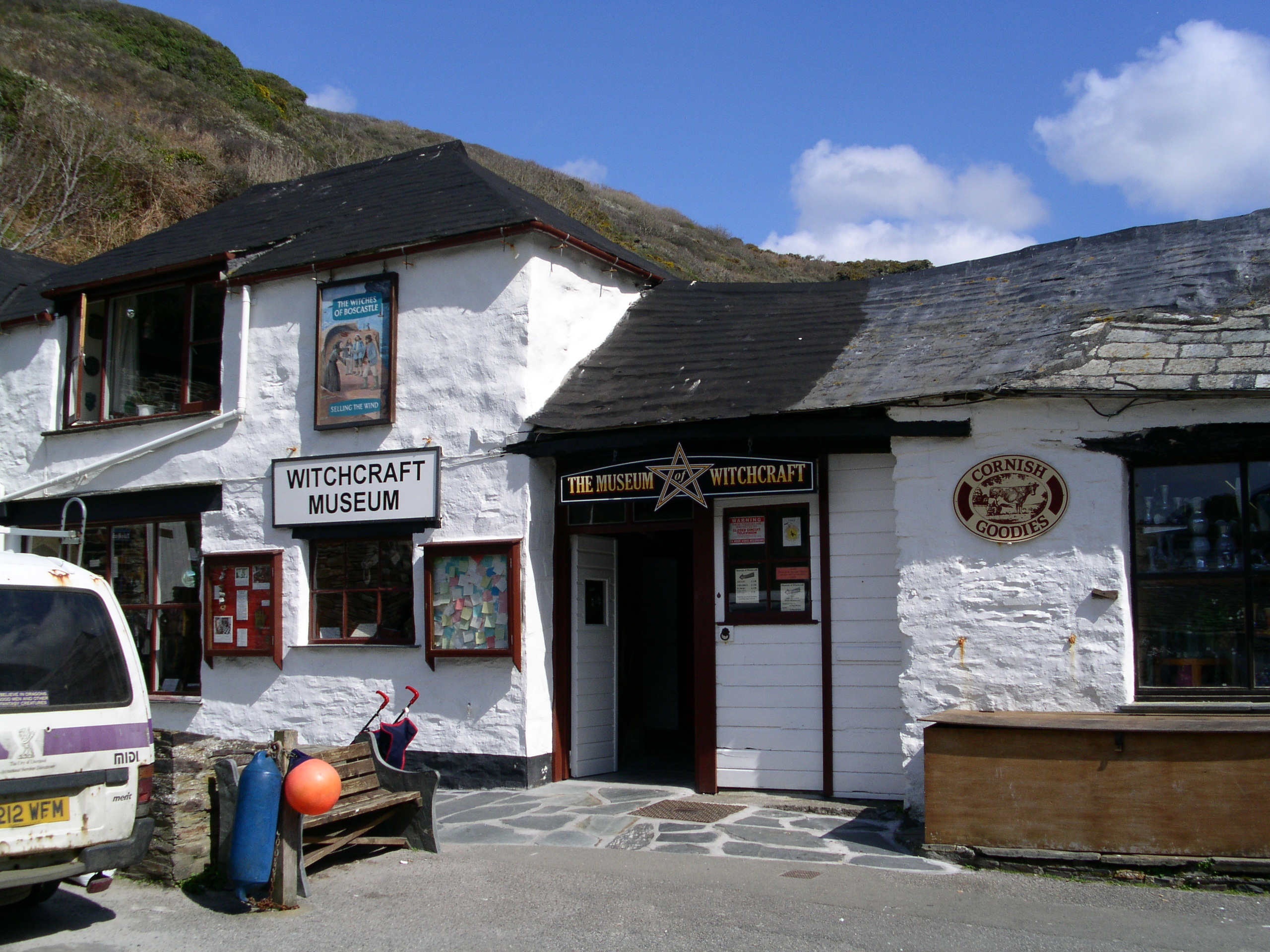 Museum of Witchcraft in Boscastle (vor der Flut 2004), Cornwall.